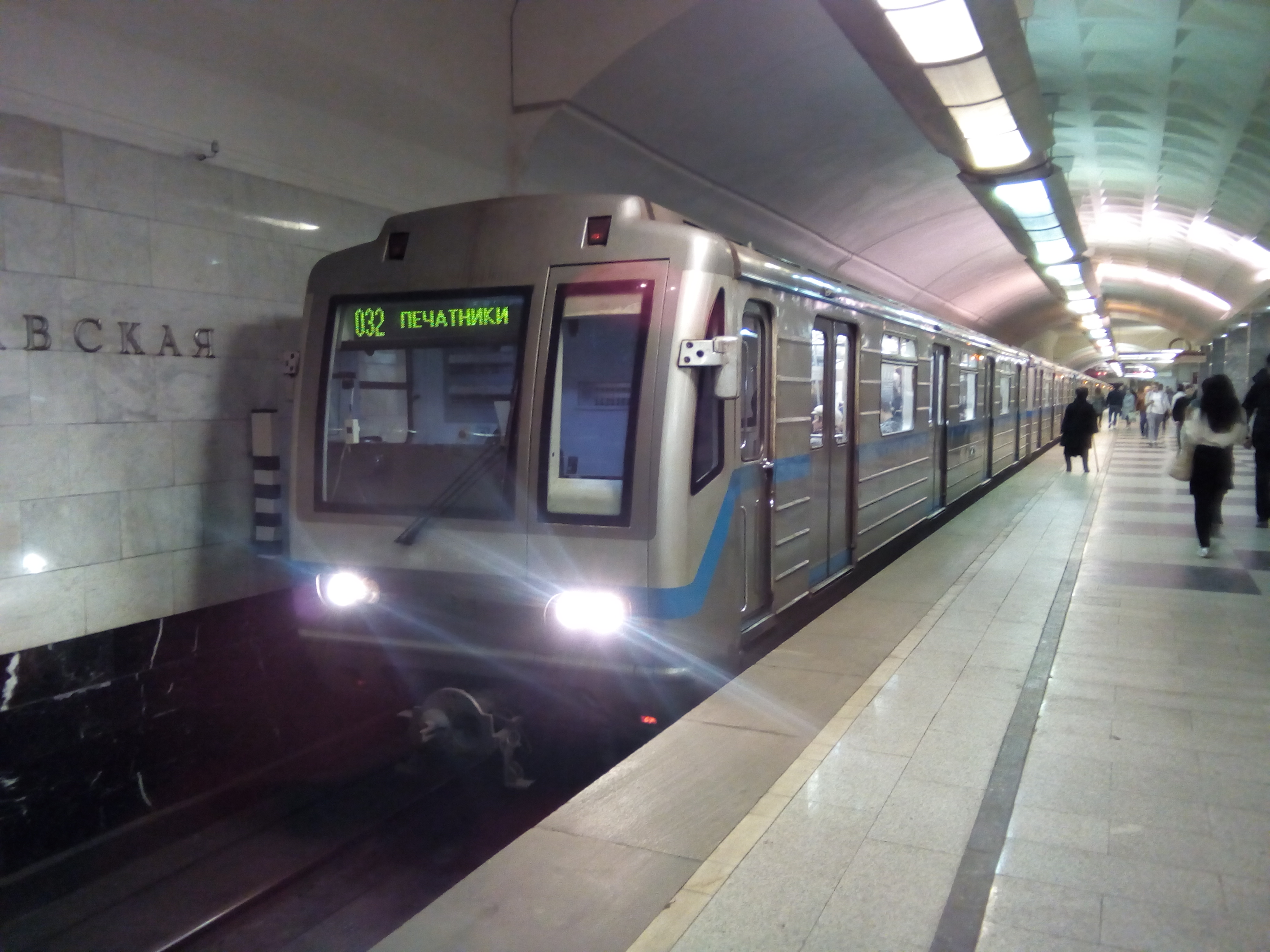 Поезд на станции метро «Братиславская», следующий лишь до станции метро «Печатники». Апрель 2018 года, снято с телефона.